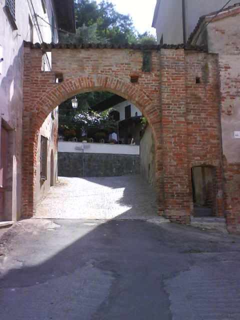 Monumento di Incisa Scapaccino